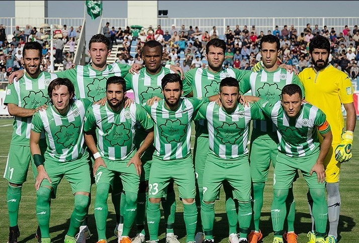 بازیکنان باشگاه فوتبال ماشین سازی تبریز در فصل ۹۶–۱۳۹۵